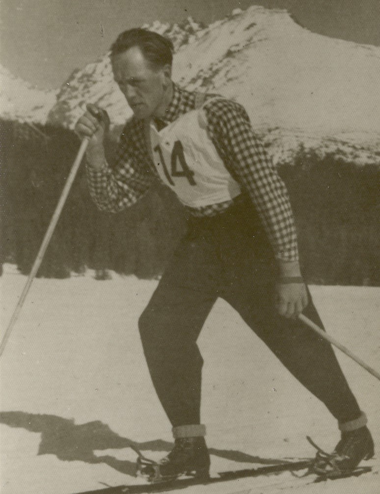 František Fišera na trati v běhu na lyžích na 50 km